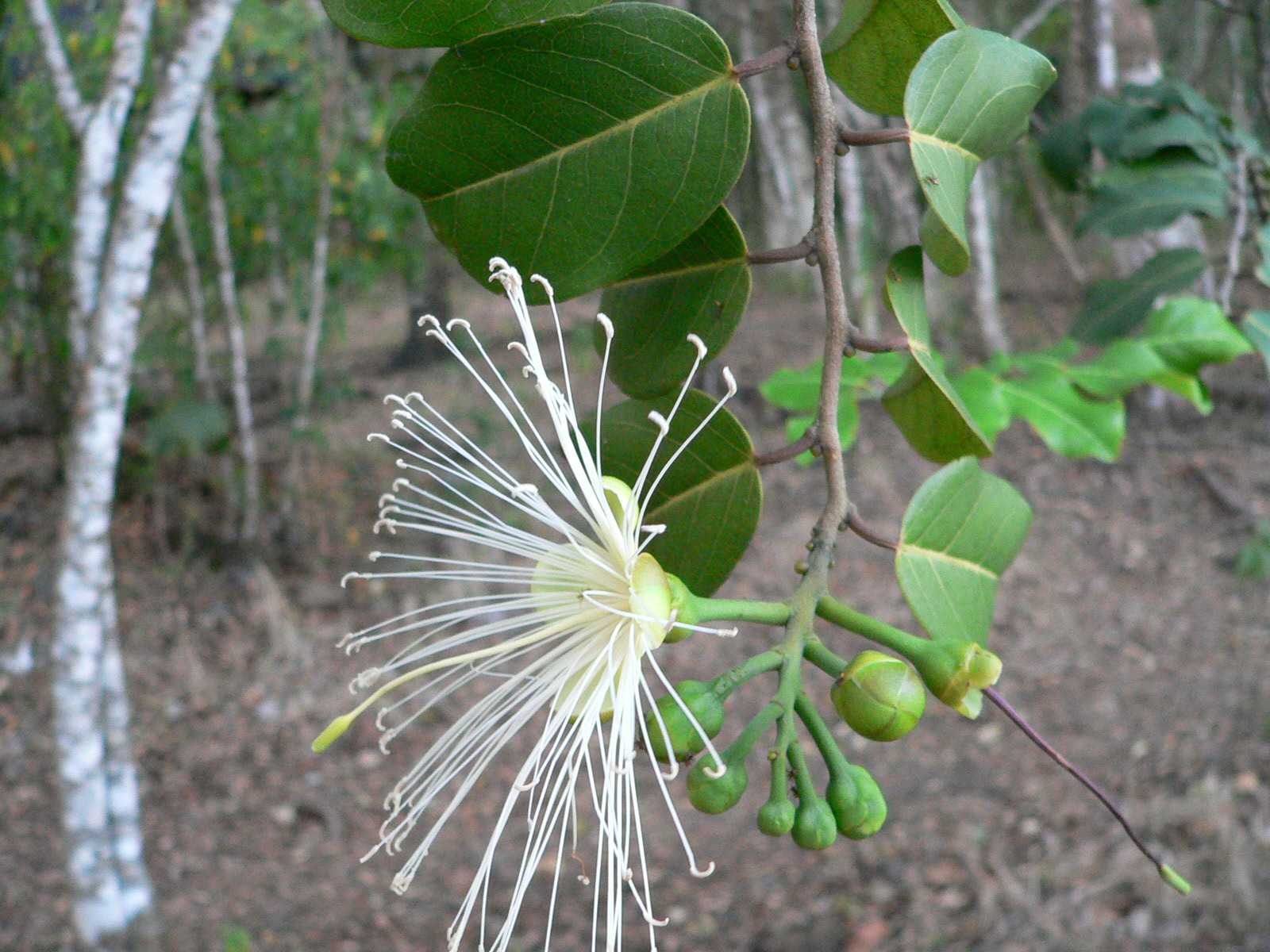 Capparis hastata, fleur, Guadeloupe